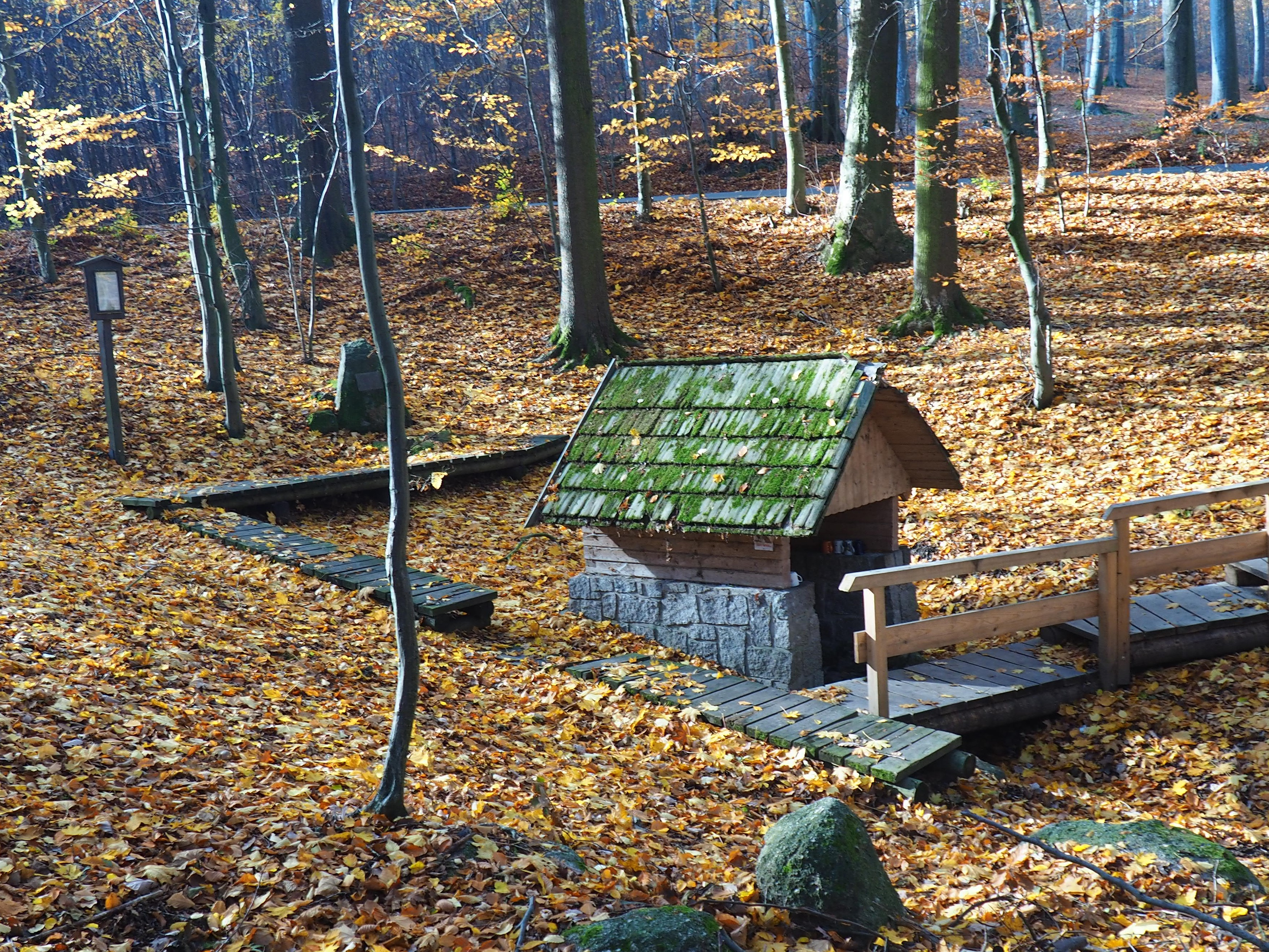 a zároveň pomník V.E.Lenharta